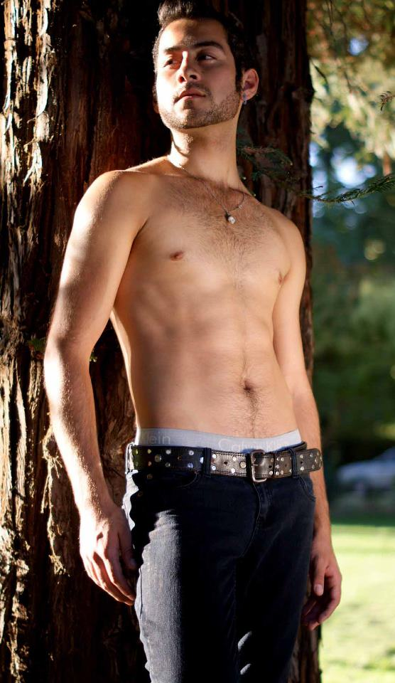 Jean Daniel representó a Chile en Mr. Gay World 2013.